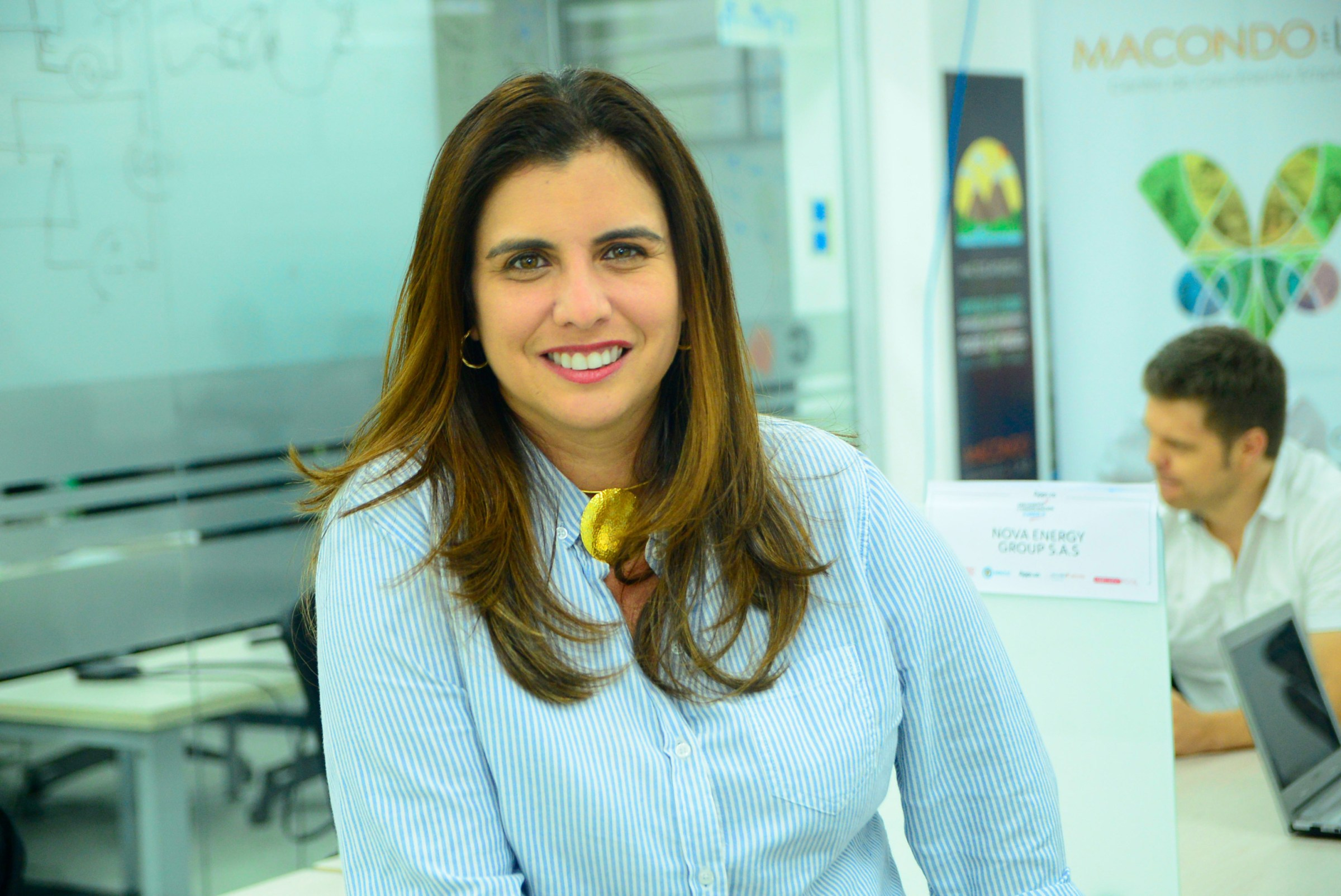 Paola Andrea Amar Sepúlveda, CEO de MacondoLab.